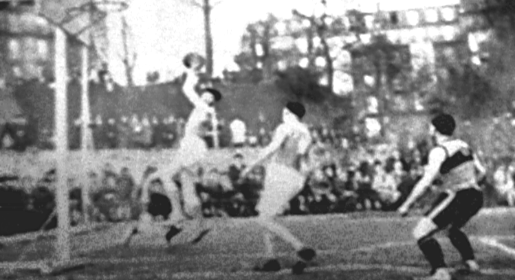 photo de la finale du championnat de France de basket-ball 1928. Ce cliché fut publié en page 11 de l'hebdomadaire sportif français Le Miroir des Sports N°420 du 3 avril 1928. Ce cliché ne porte pas de mention sur l'identité du photographe (photo d'agence). C'est donc un cliché dit "anonyme" qui tombe dans le domaine public en France 70 ans après sa publication. Source : photo perso du numéro du Miroir des Sports de ma collection. User:Clio64 Retouche de Image:Championnat de France basket-ball 1928.png par Rogilbert | 商谈, 3 septembre 2007 à 13:23 (CEST)